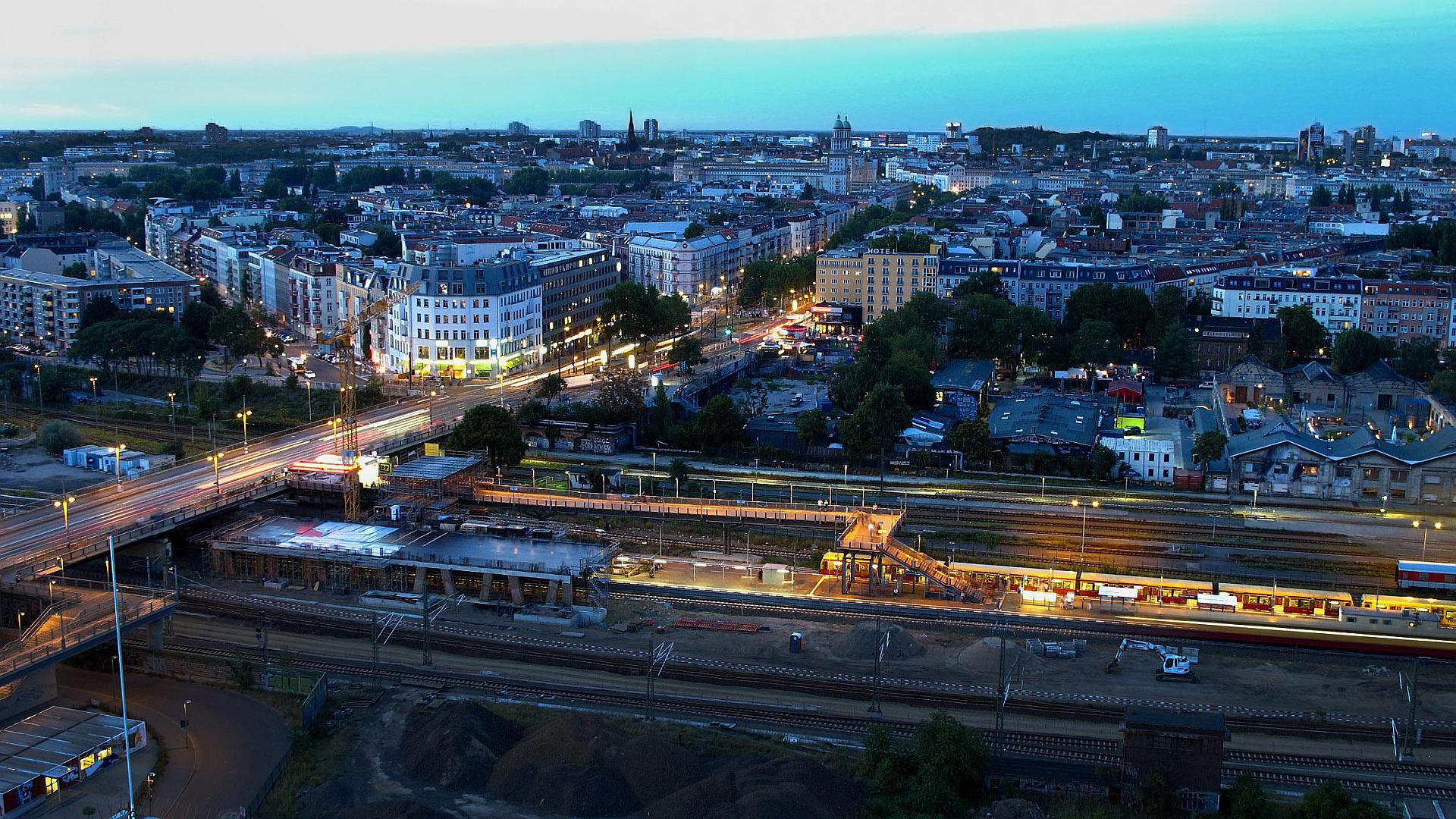 Webcam mit Blick auf den S-Bahnhof Berlin Waschauer Straße